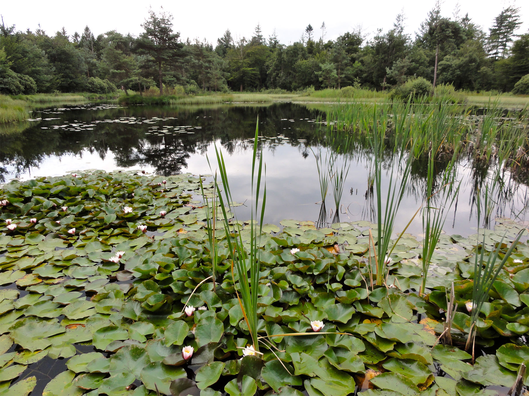 Freulevijver in 't Oude Bosch in de gemeente Opsterland